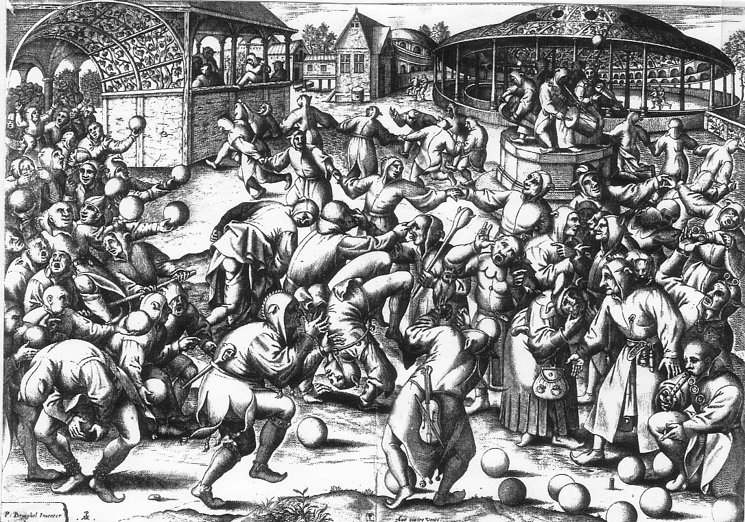 Narrenkonvent um 1500. Pieter Breugel, südniederländischer Maler, Zeichner und Druckgrafiker. Antwerpen (1551–1563), Italien (1553), Brüssel (1563–1569)